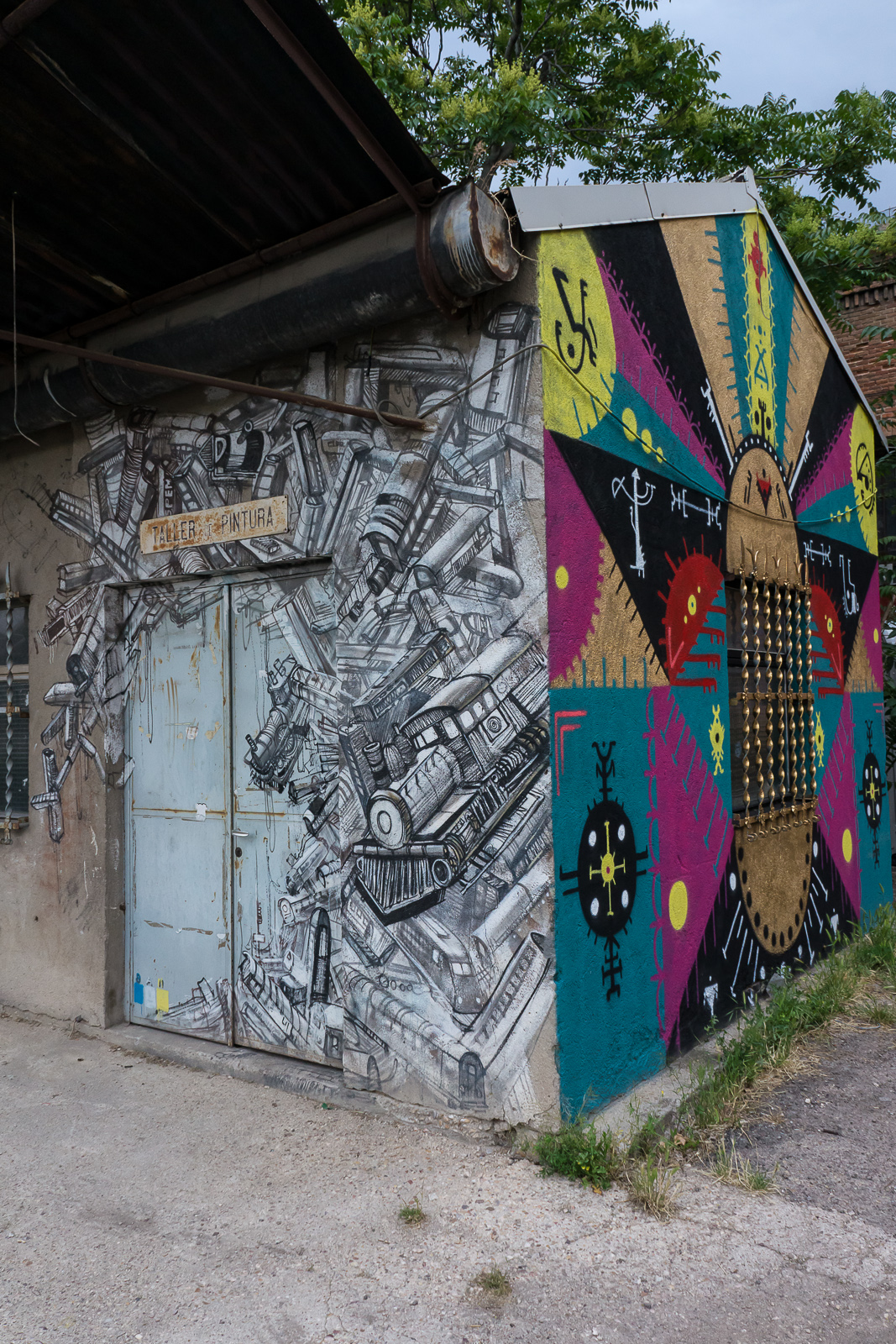 SAN Atocha